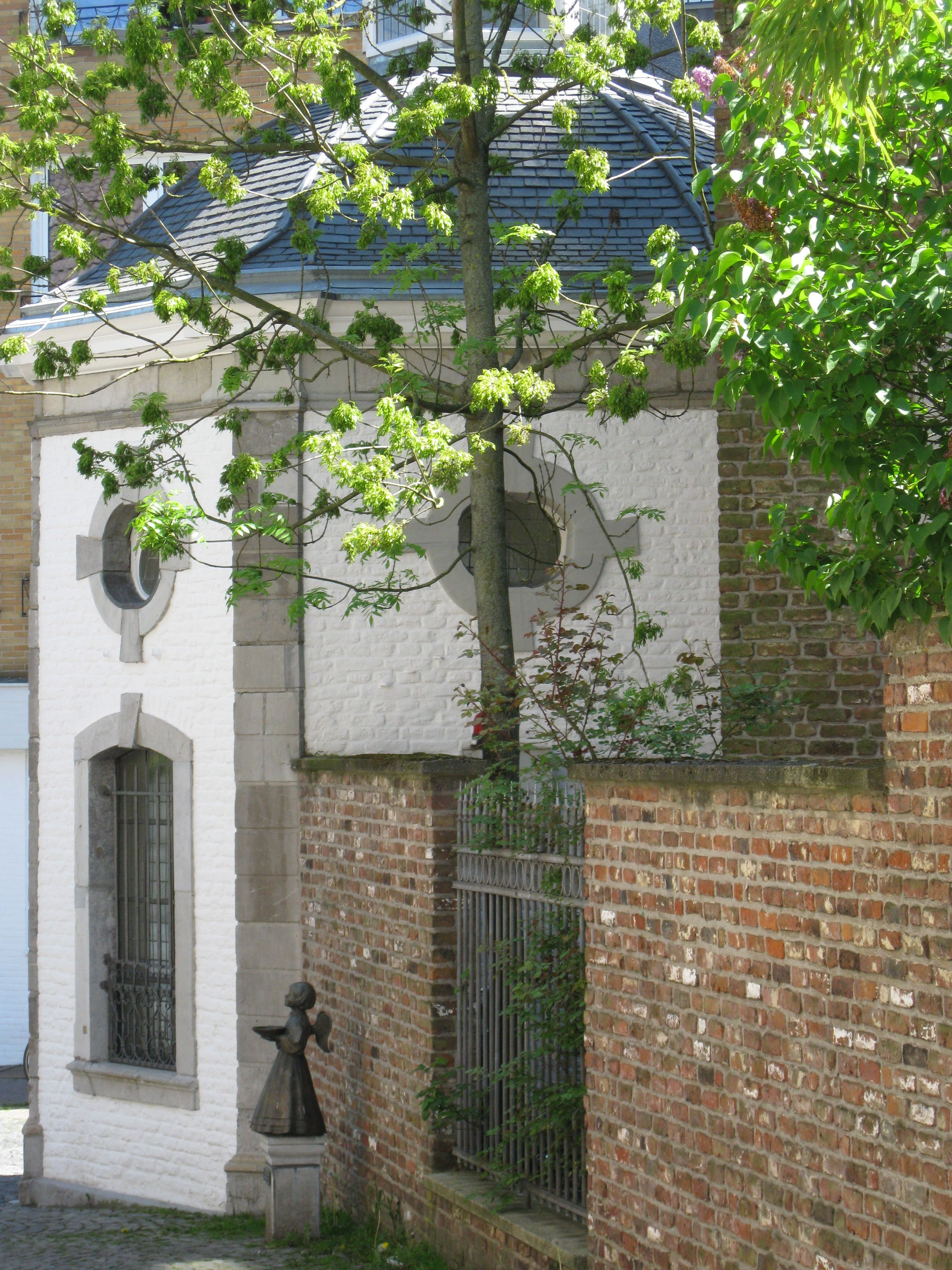 Roskapellchen mit dem StreuengelchenThis is a photograph of an architectural monument., no. 0